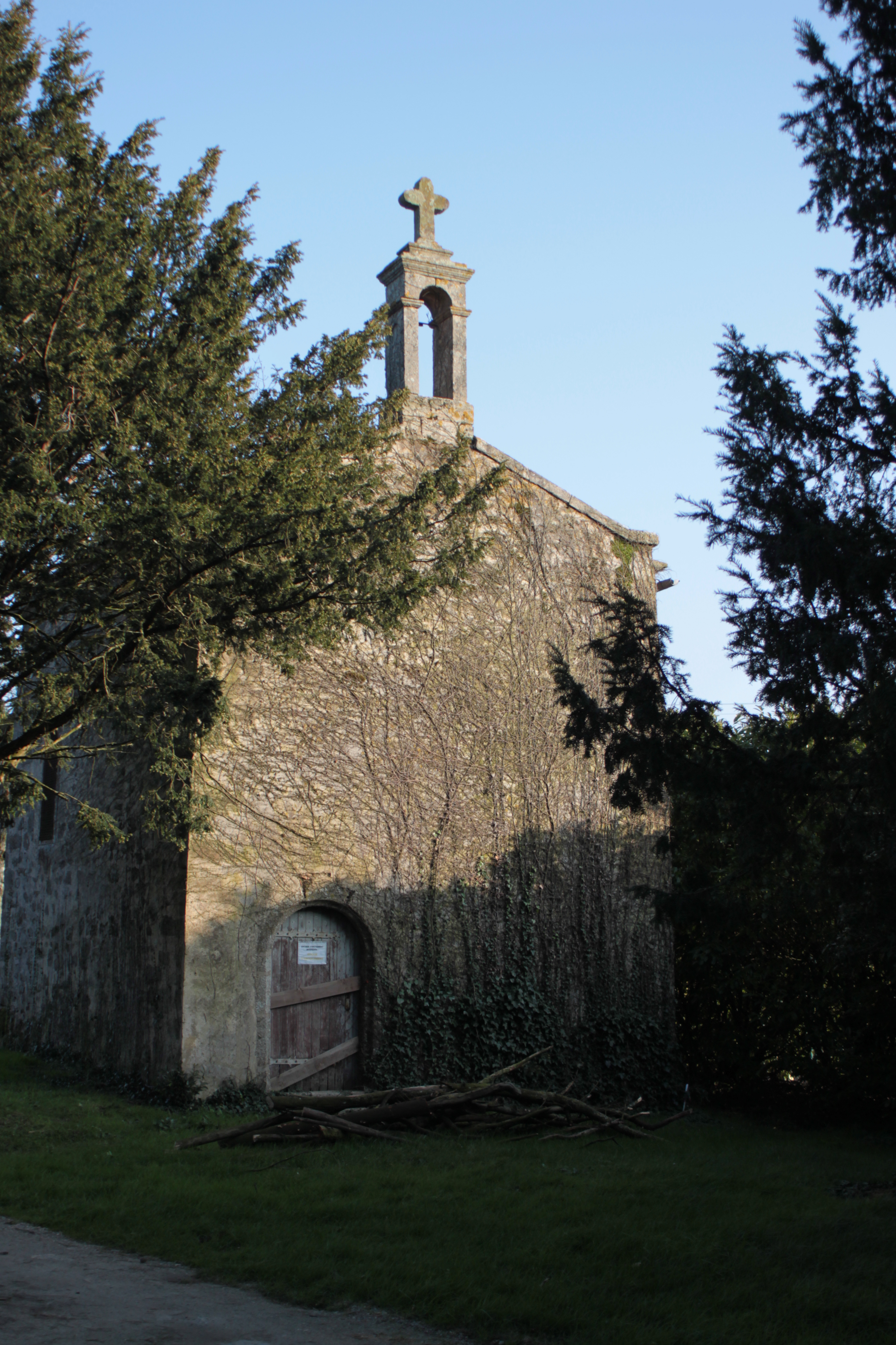 Chapelle du Meslay, Fr-85-La Guyonnière.